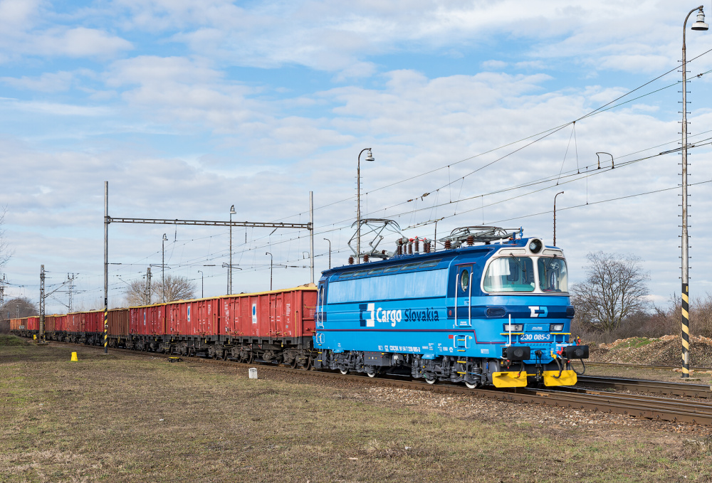 V roce 2018 výrazně narostl podíl přeprav realizovaných na Slovensku prostřednictvím společností CD Cargo Slovakia a Carborail.